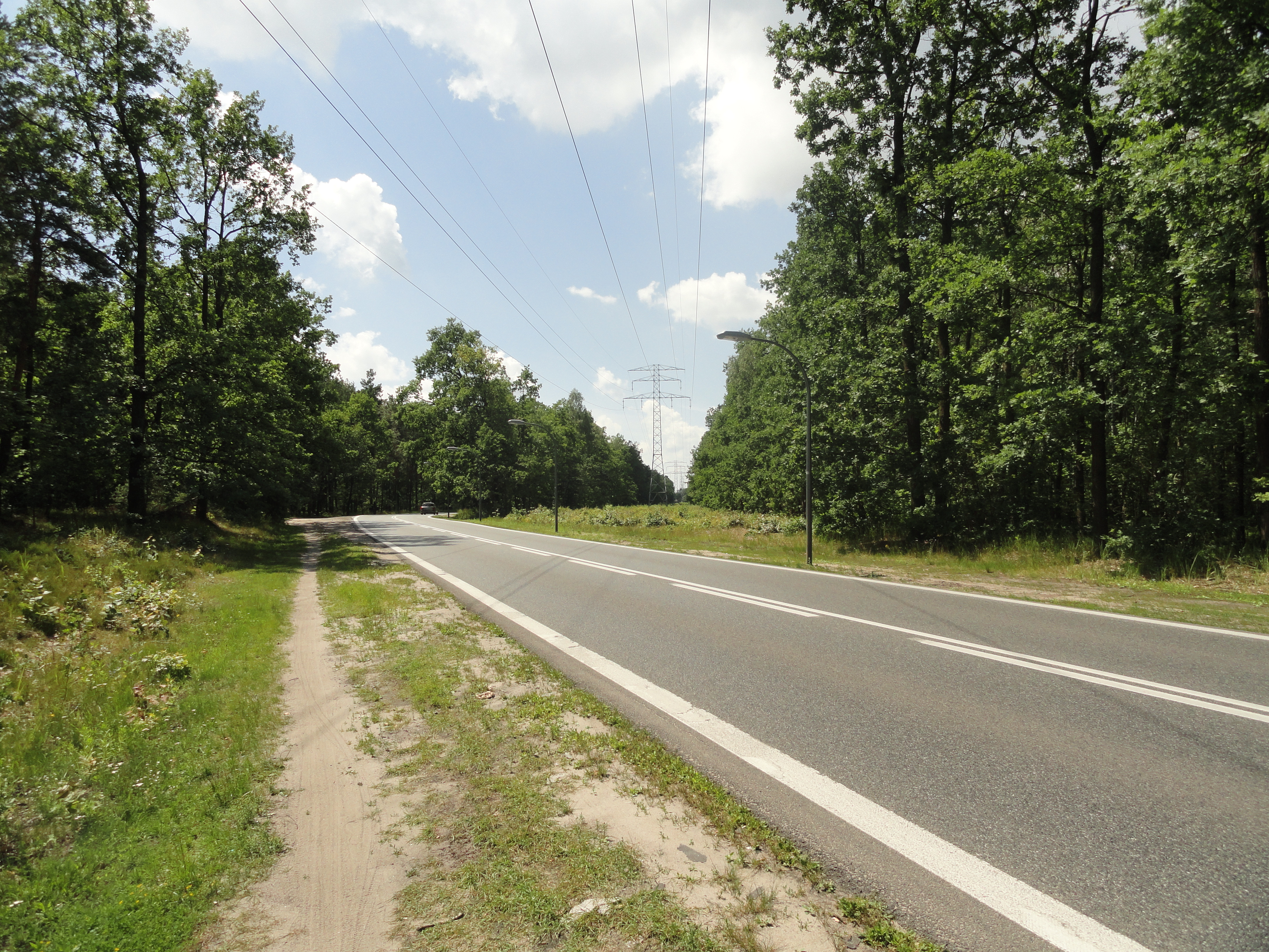 Ulica Korkowa w Warszawie, niedaleko wjazdu do Wesołej. Widok wgłąb Wawra.